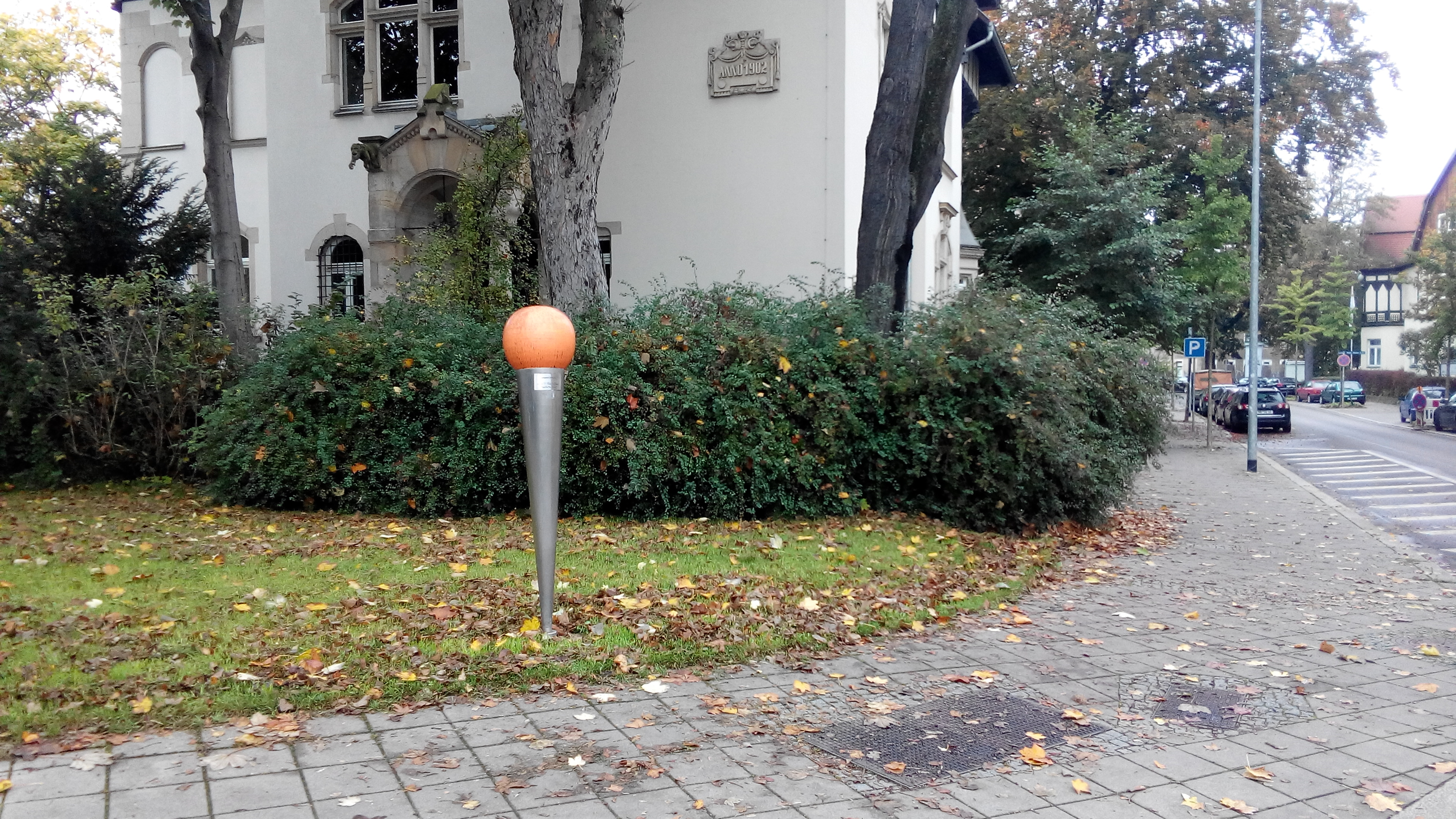 Denknadel vor der Adresse Straße des Friedens 1 in Erfurt. Erinnert wird an Hilde und Carl Ludwig Spier.